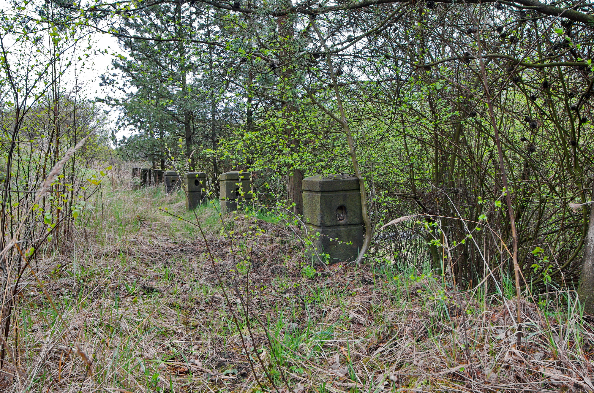 Královské Poříčí, zaniklá Buštěhradská dráha, okres Sokolov